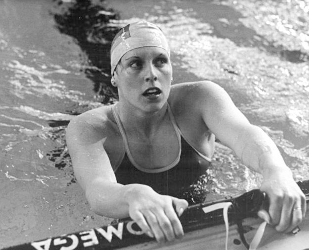 Kathleen Nord ADN-ZB Hirndorf 16.6.87 Erfurt: 38. DDR-Meisterschaften im Sportschwimmen- Im 400-m-lagen-Endlauf der Damen holte sich Welt- und Europameisterin Kathleen Nord (SC Magdeburg) mit 4:45,71 min das vierte Meisterschaftsgold in Reihenfolge.